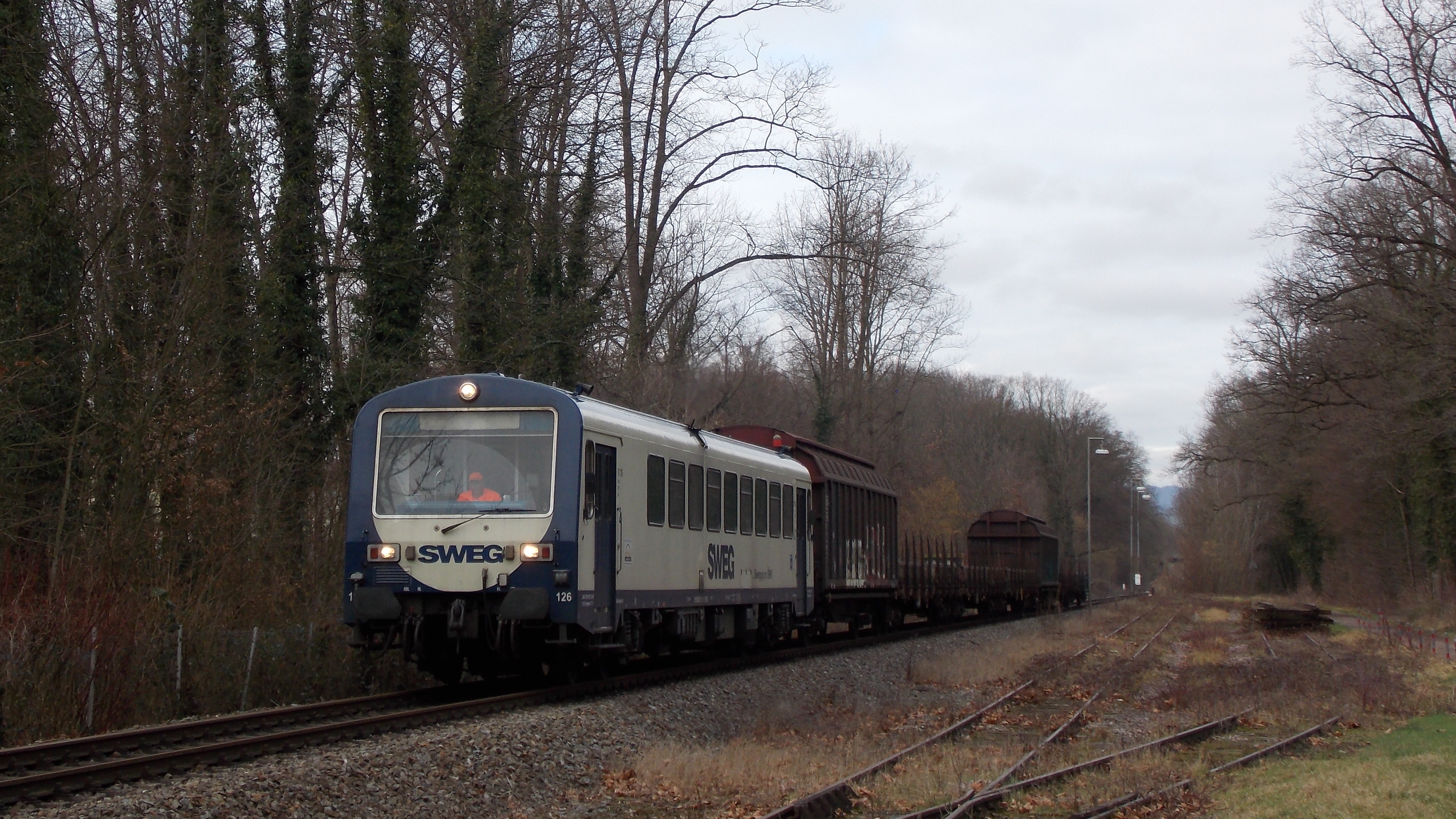 Der NE81 "VT 126" der SWEG am 5. Februar 2016 in Freiburg-West